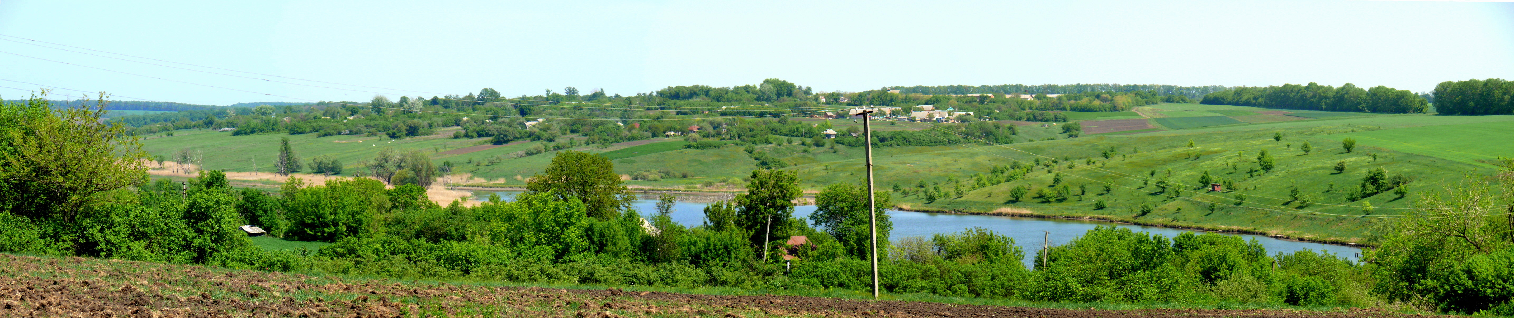 Хомутівка. Кукочка. Лівий берег річки Коломак.